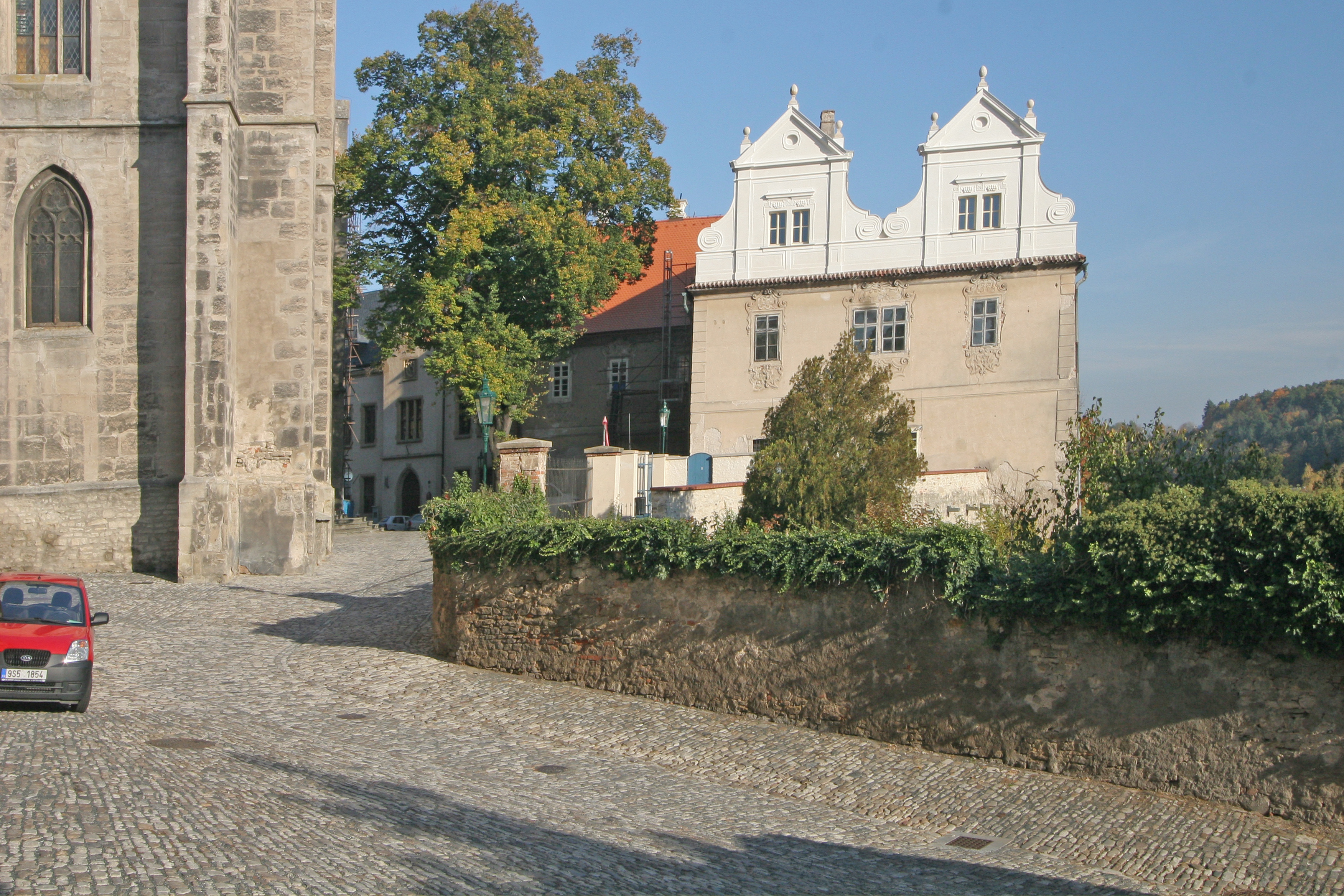 Děkanství - arciděkanský úřad (Kutná Hora), Jakubská 1, Kutná Hora